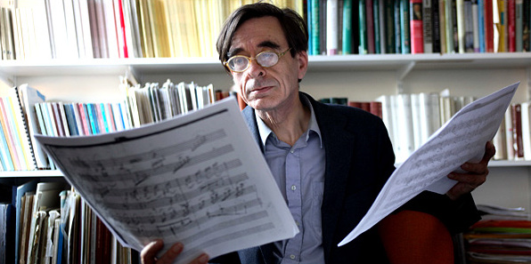 Eigenes Foto